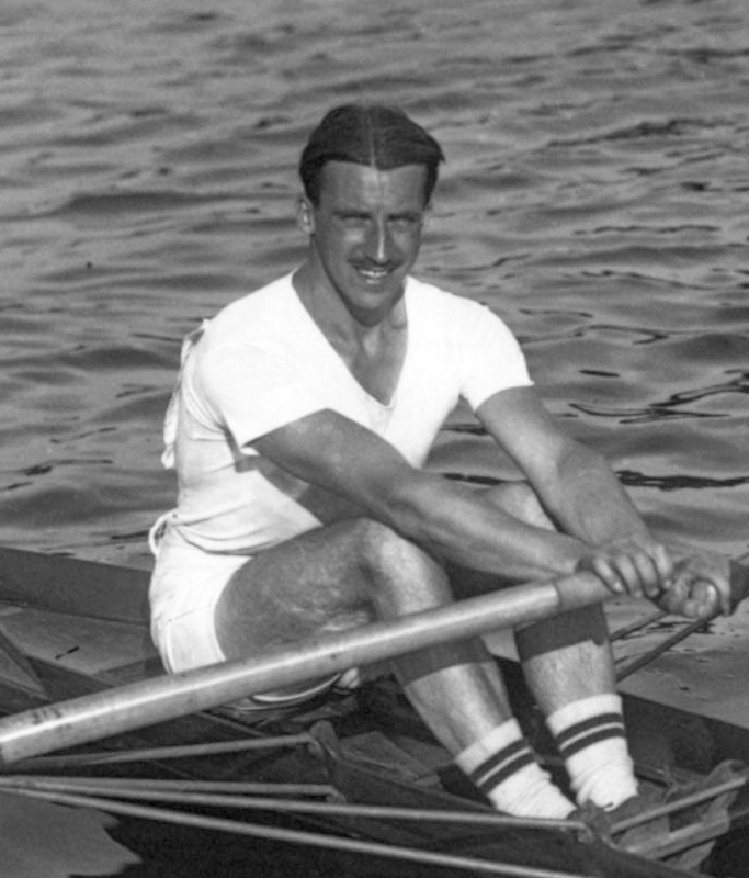 24-8-13, Gand [canal Gand-Terneuzen], Peresselenzeff [champions d'Europe d'aviron en deux rameurs de couple] : [photographie de presse] / [Agence Rol]